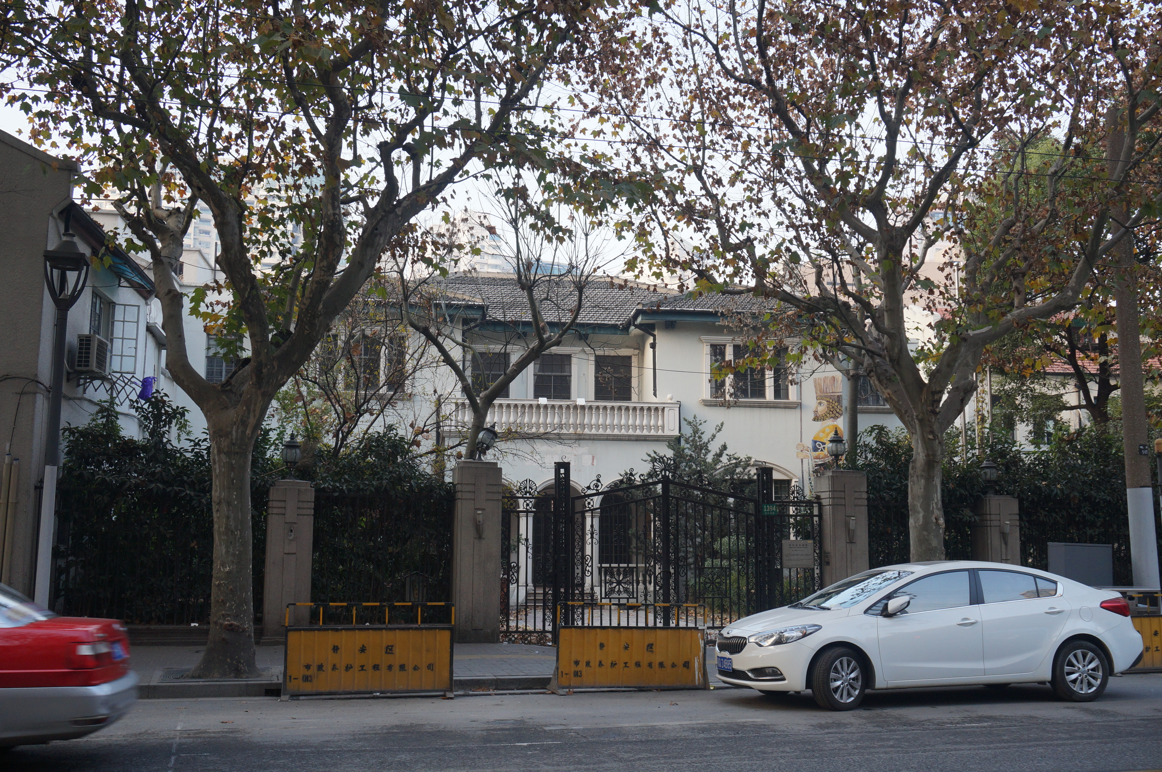 上海市第四批优秀历史建筑——北京西路1394弄2号